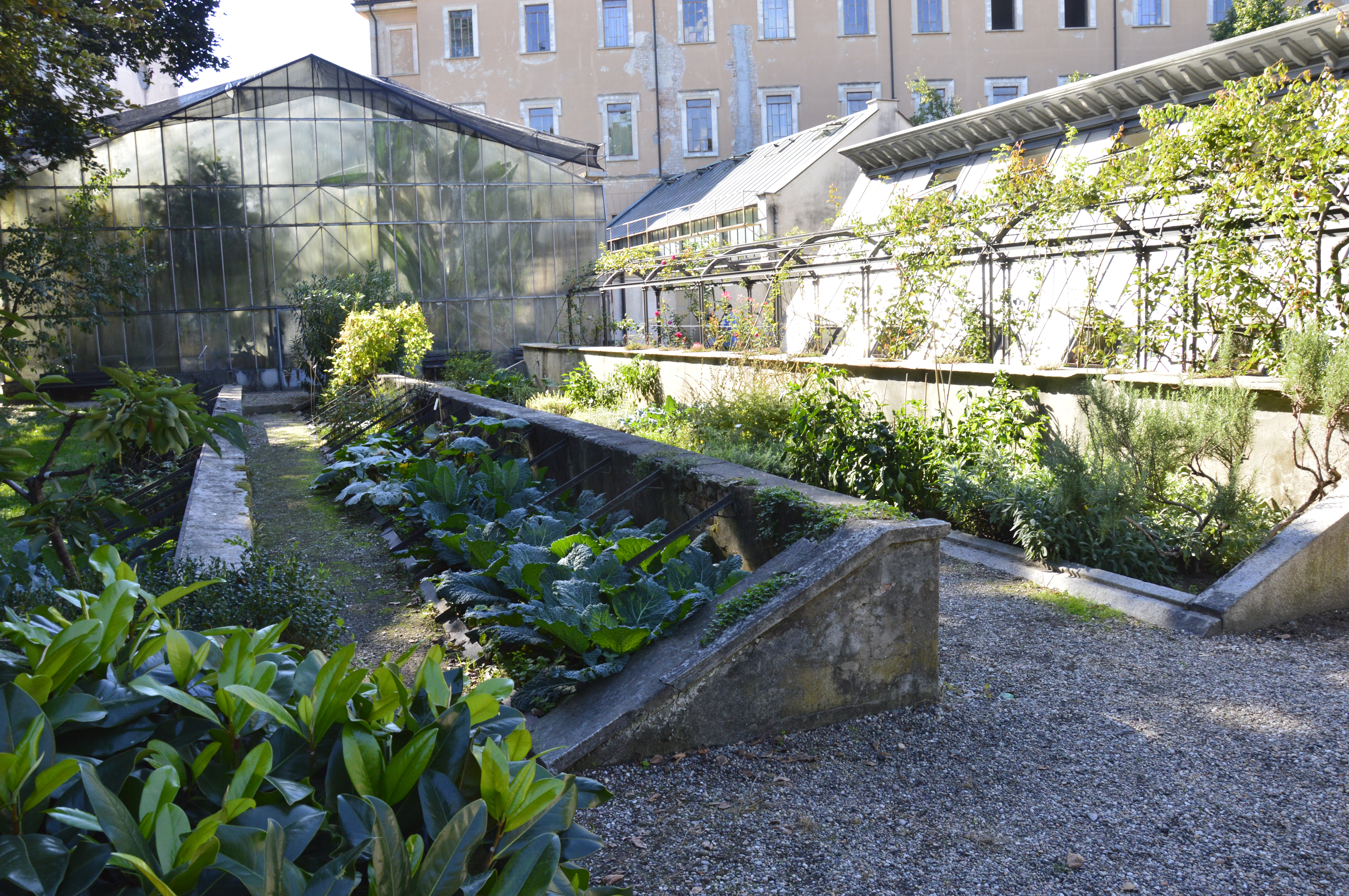 Orto Botanico dell'Università di Pavia This is a photo of a monument which is part of cultural heritage of Italy.